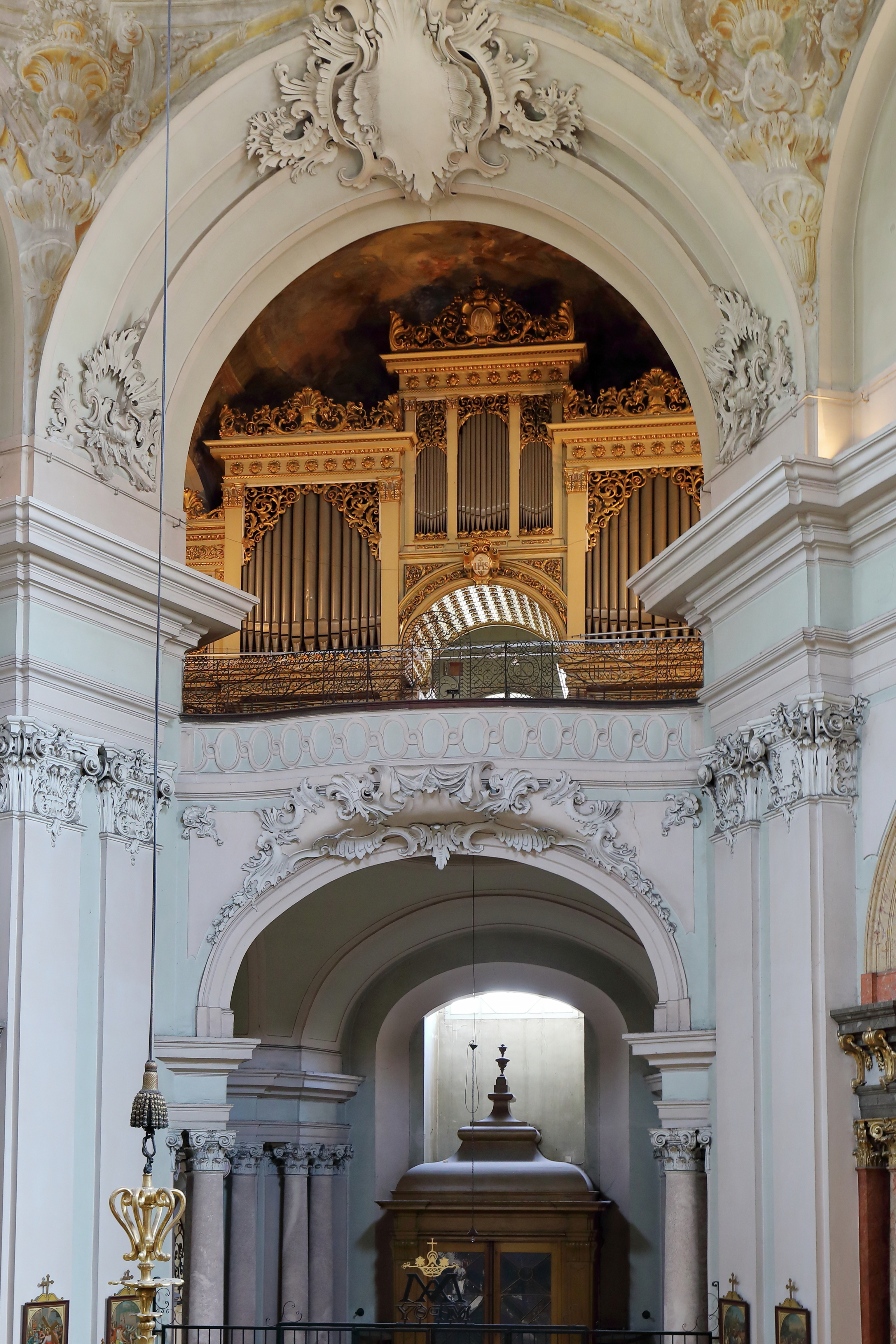 Die Orgel der Piaristenkirche Maria Treu am Jodok-Fink-Platz im 8. Wiener Gemeindebezirk Josefstadt. Die Orgel wurde unter der teilweisen Verwendung der Vorgängerorgel von Joseph Loyp (1843) von dem im schlesischen Hirschberg (heutiges Jelenia Góra) ansässigen Orgelbauer Carl Karl Friedrich Ferdinand Buckow von 1856 bis 1858 gefertigt. Sie ist eine rein mechanische Schleifladenorgel mit 36 Registern auf drei Manualen und Pedal und hat 2416 Pfeifen.